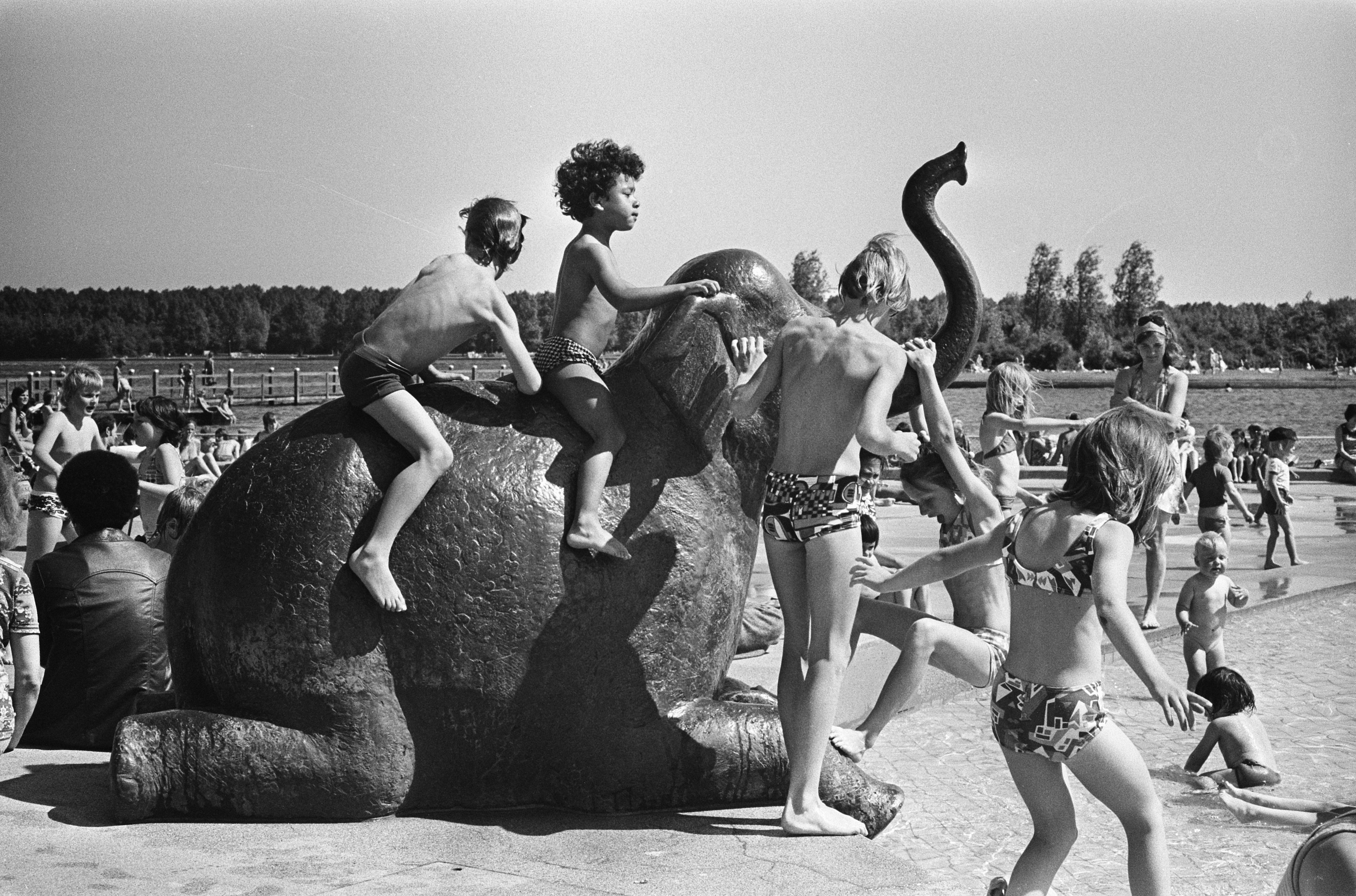 Collectie / Archief : Fotocollectie Anefo Reportage / Serie : Zomerweer in Amsterdam Beschrijving : Kinderen spelend op het beeld van een olifant in het Sloterparkbad Datum : 11 juni 1975 Locatie : Amsterdam, Noord-Holland Trefwoorden : badgasten, beelden, kinderen, zwembaden Fotograaf : Fotograaf Onbekend / Anefo Auteursrechthebbende : Nationaal Archief Materiaalsoort : Negatief (zwart/wit) Nummer archiefinventaris : bekijk toegang 2.24.01.05 Bestanddeelnummer : 927-9824